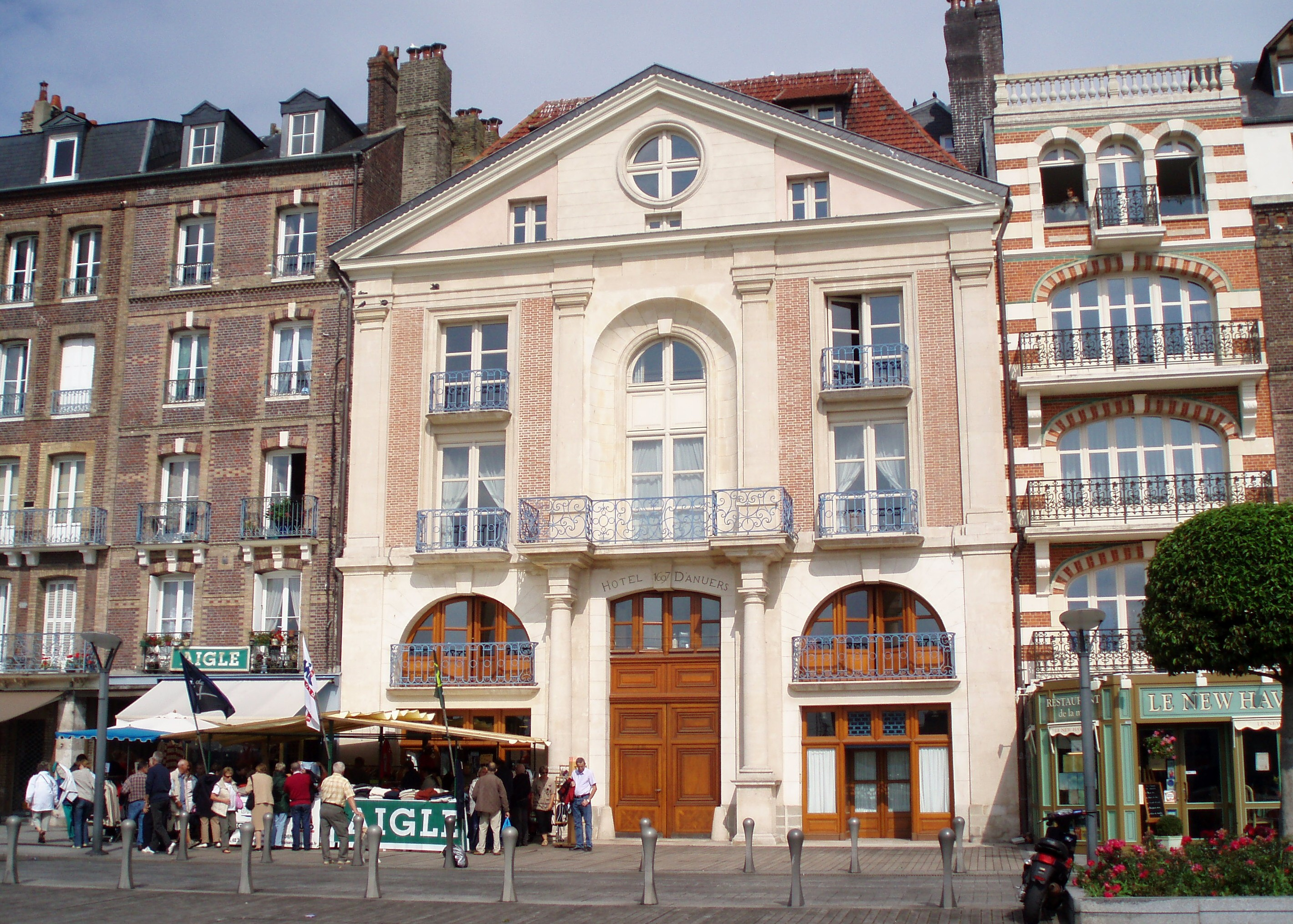 Auteur: Georgio Sujet : Hotel d'Anvers Lieu : Dieppe, Seine-Maritime Année : 2006